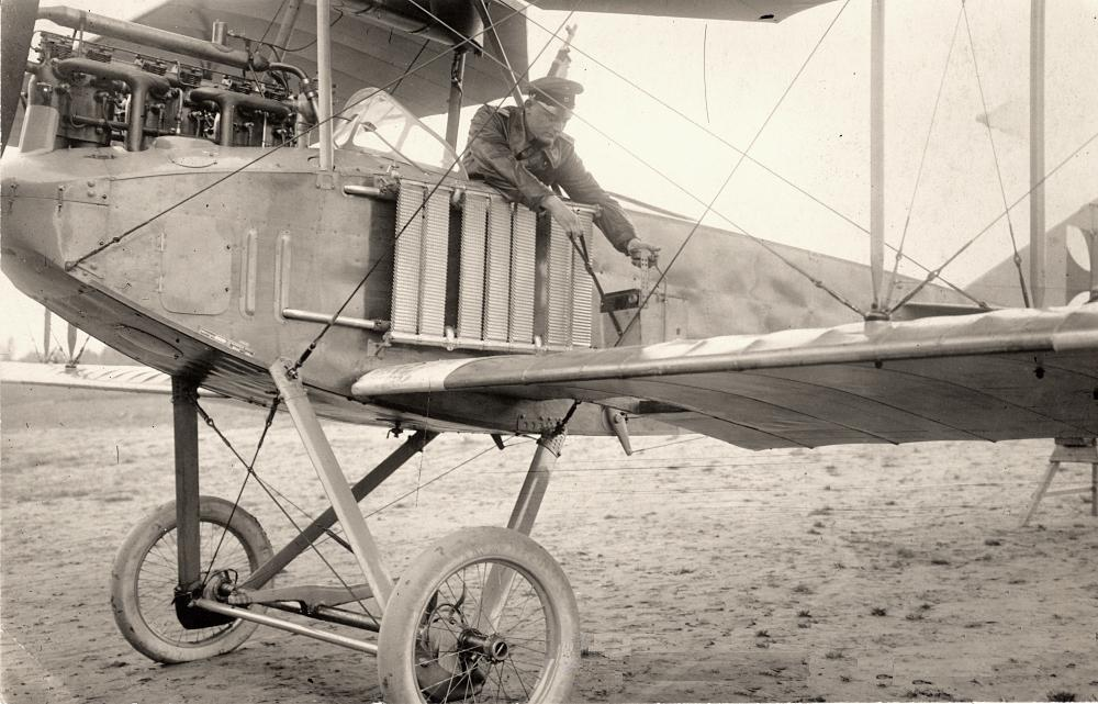 In eine Albatros B II wird gerade ein Zusatzgerät eingebaut